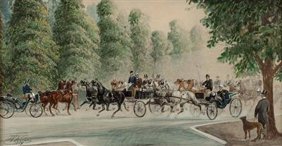 Das Überholmanöver - Kutschenausfahrt in der Parkalleetitle QS:P1476,de:"Das Überholmanöver - Kutschenausfahrt in der Parkallee" label QS:Lde,"Das Überholmanöver - Kutschenausfahrt in der Parkallee"